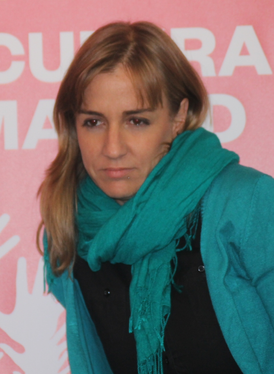 Acto con Tania Sánchez y Jordi Escuer en Moralzarzal